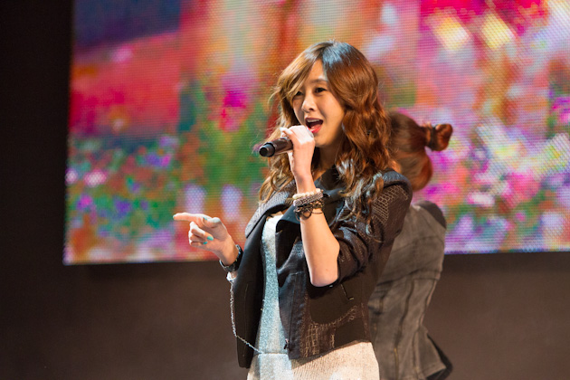 Lg전자가 3월 31일, 4월 1일 양일간 서울 잠실동 롯데월드 아이스링크에서 'lg 시네마3d 월드페스티벌'을 성황리에 개최했다.